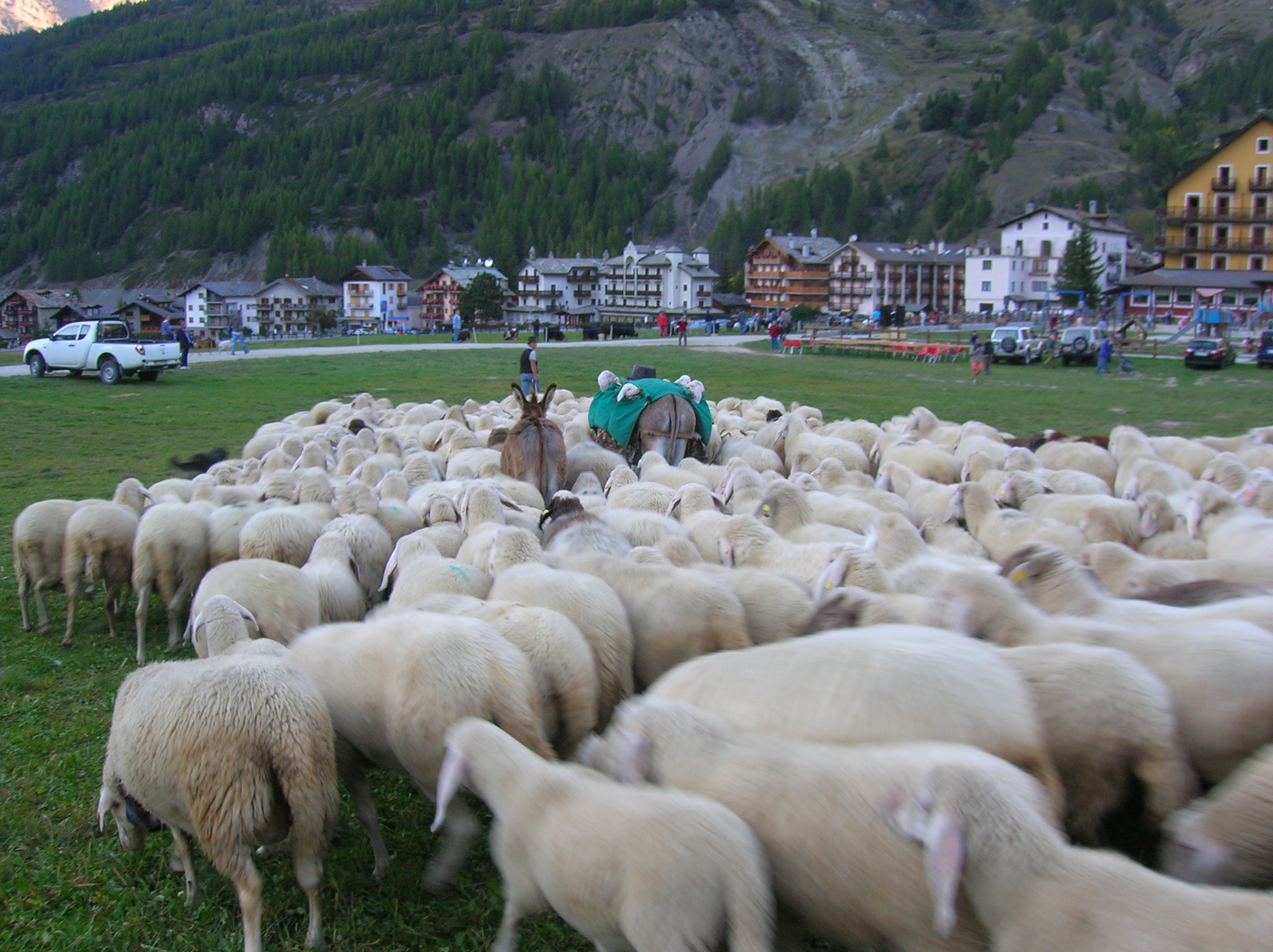 Gregge sceso dall'alpeggio - Devétéya é Féra (Festa della desarpa, ossia della discesa dagli alpeggi con le mandrie). 1 ott 2011, Cogne, Valle d'Aosta, Italia.